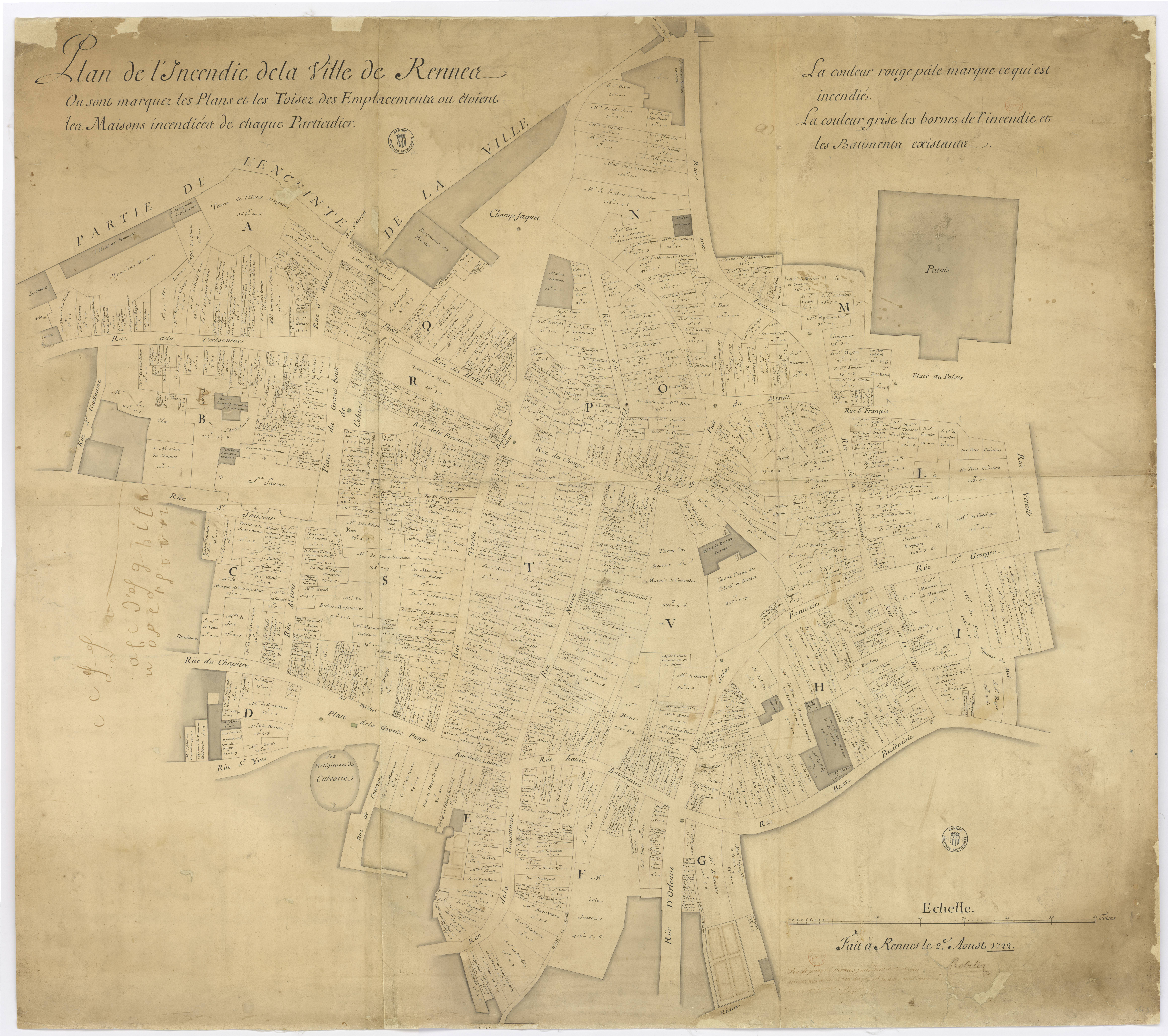 Plan (1722) de l'incendie de la ville de Rennes où sont marqués les plans et les toises des emplacements où étaient les maisons incendiées de chaque particulier. Le plan est délimité par une partie de l'enceinte de la ville, la rue Saint-Guillaume, la rue Veralle et la rue de Basse Baudrairie. Archives municipales de Rennes, 1 Fi 1.